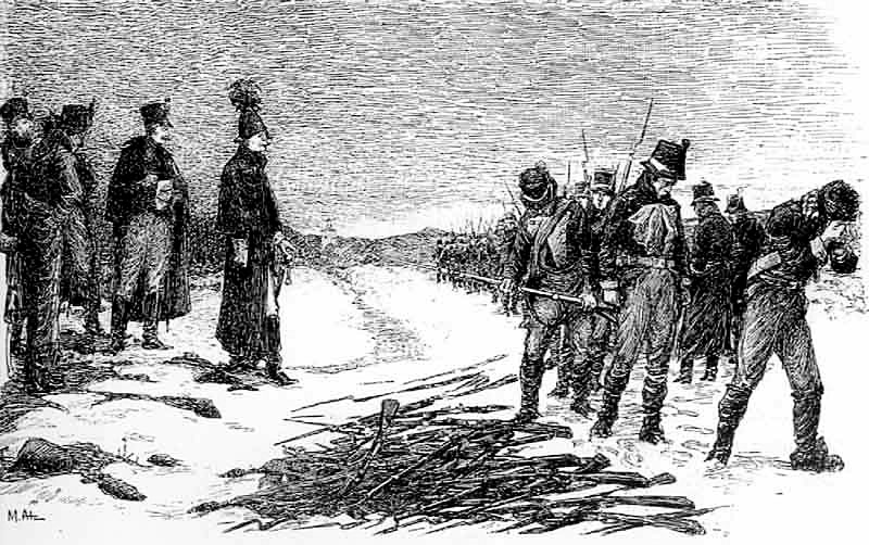 Капитуляция шведов в Финляндии 1808 год